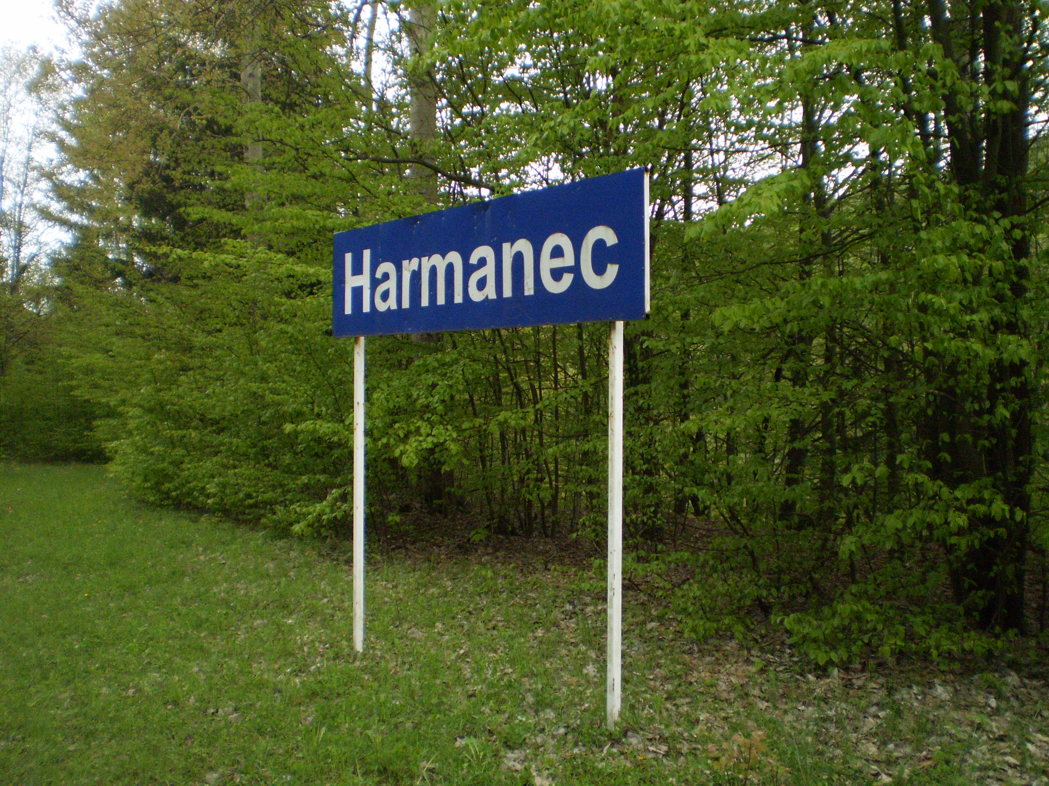 zastávka Harmanec